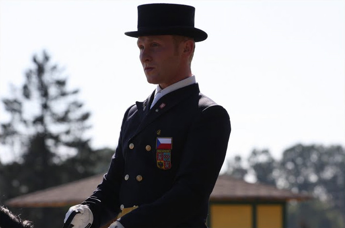 Fabrizio Sigismondi